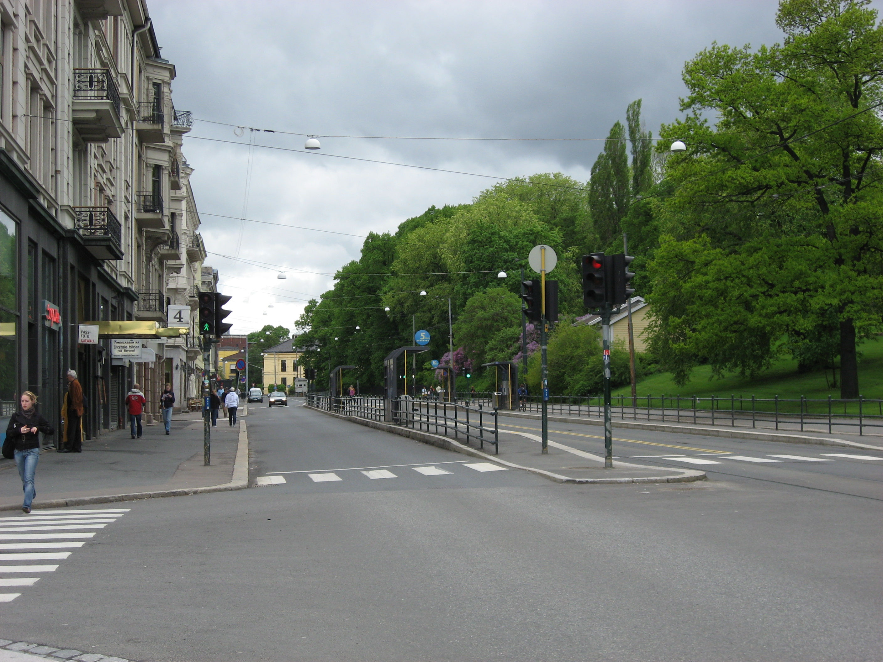 Henrik Ibsens gate in Oslo, looking west